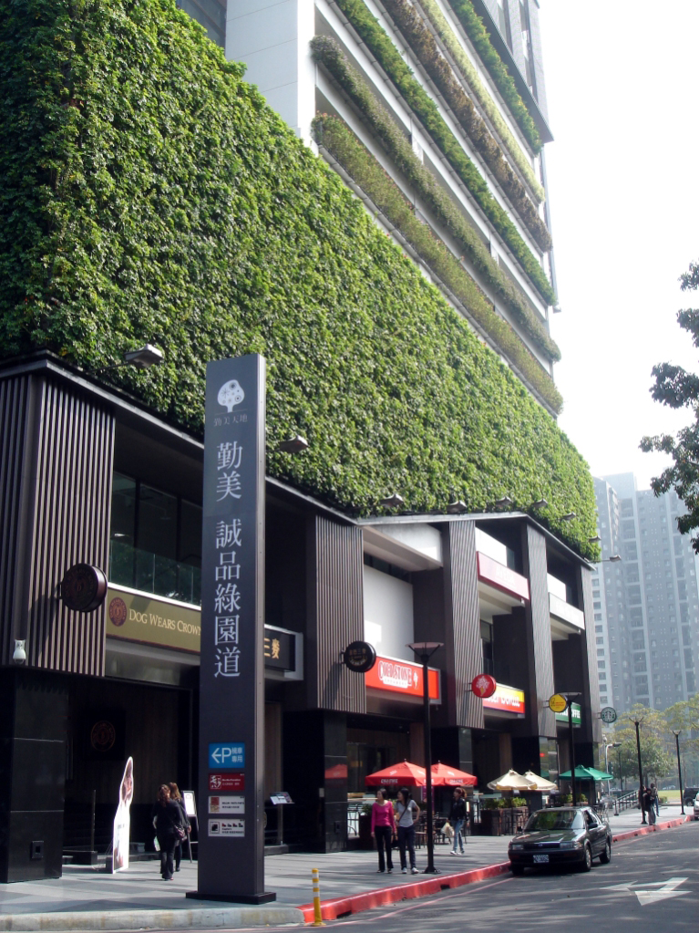 經國綠園道旁的勤美誠品綠園道